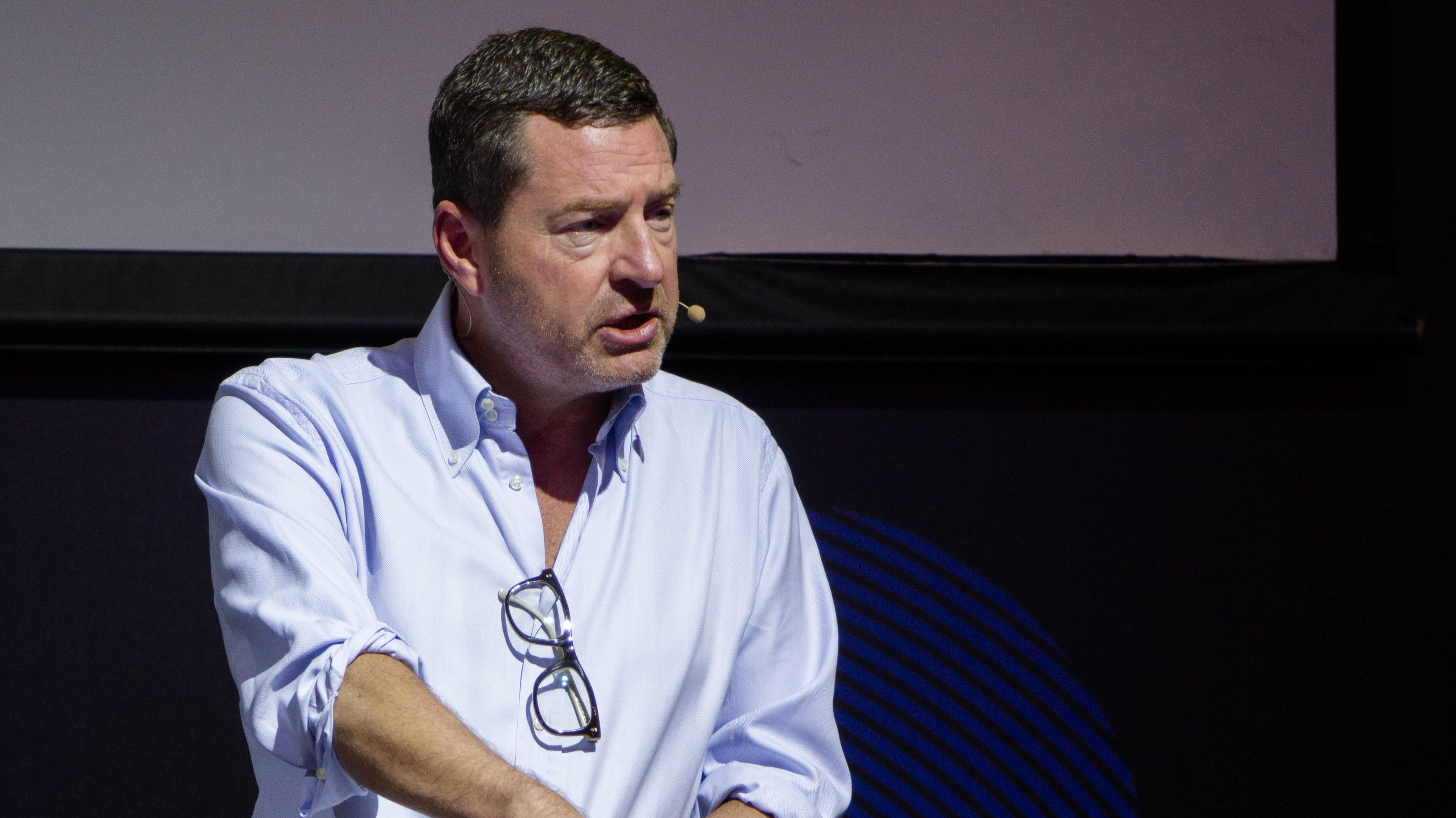 Кай Дикманн, издатель Bild, на MediaMakers 2016 в Москве